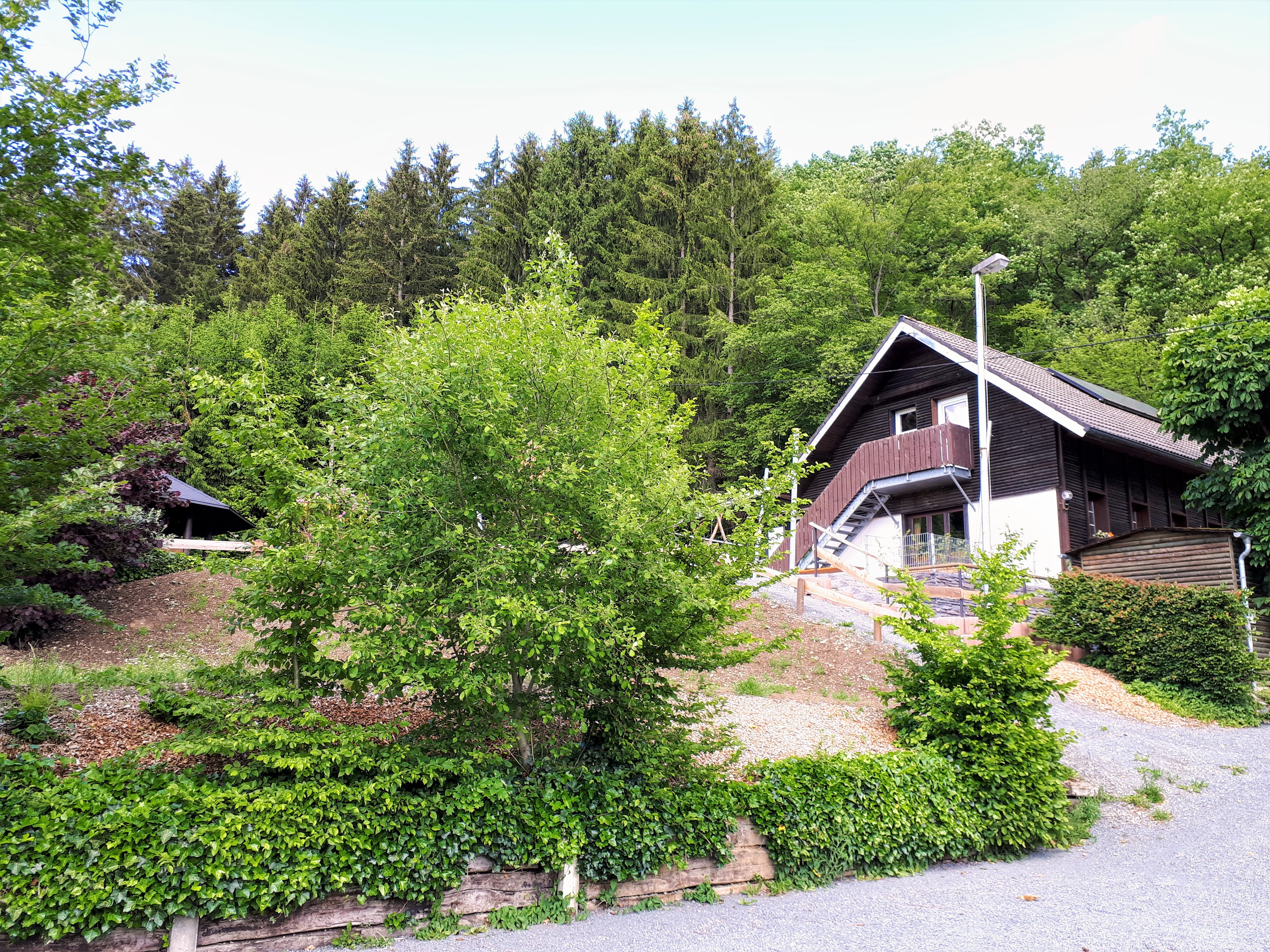 SGV-Hütte in Oberelspe mit Gastraum, Außenbereich und Übernachtungsmöglichkeiten. Umfassende Renovierung zuletzt im Jahr 2019